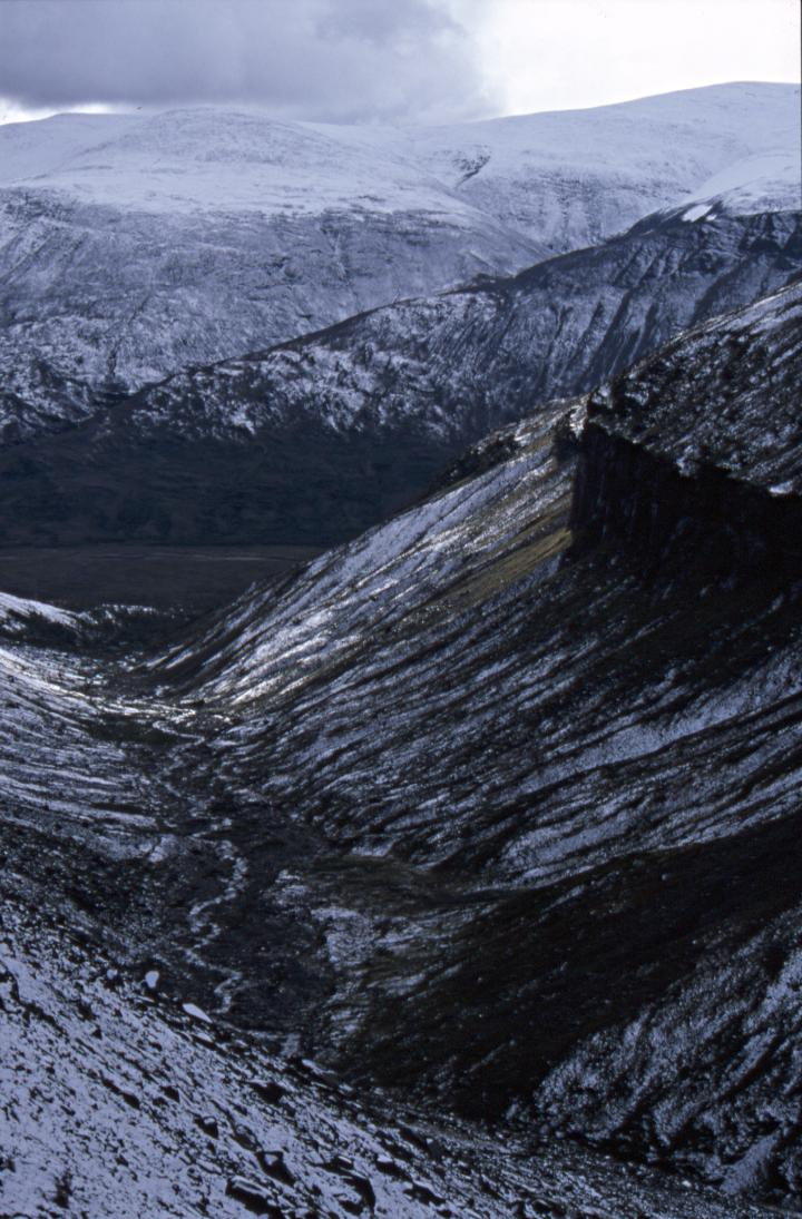 Tarfalavagge lower part ending in Ladtjovagge, photographed from Kekkonen-toppen.